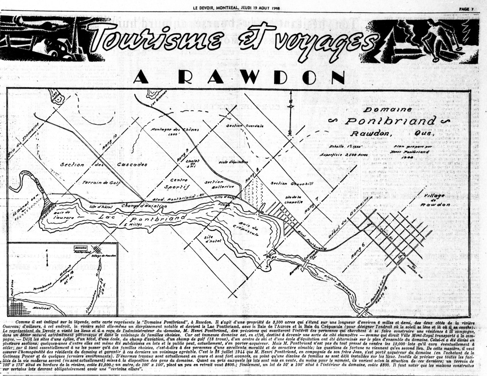 Plan du domaine Pontbriand paru dans le Devoir du 18 août 1948